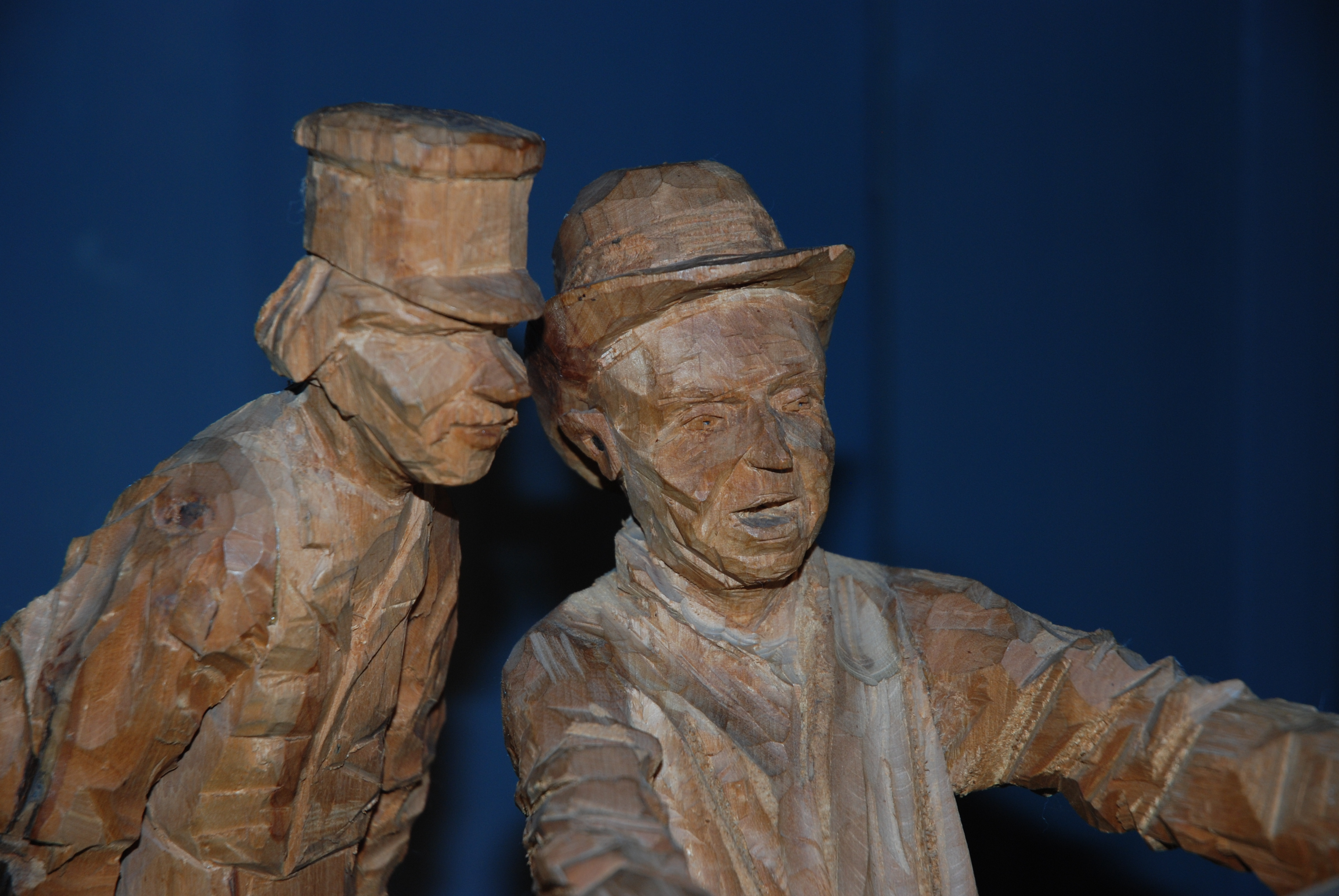 Self Portrait, Wooden Sculptor Axel Peterson, "Doderhultarn"